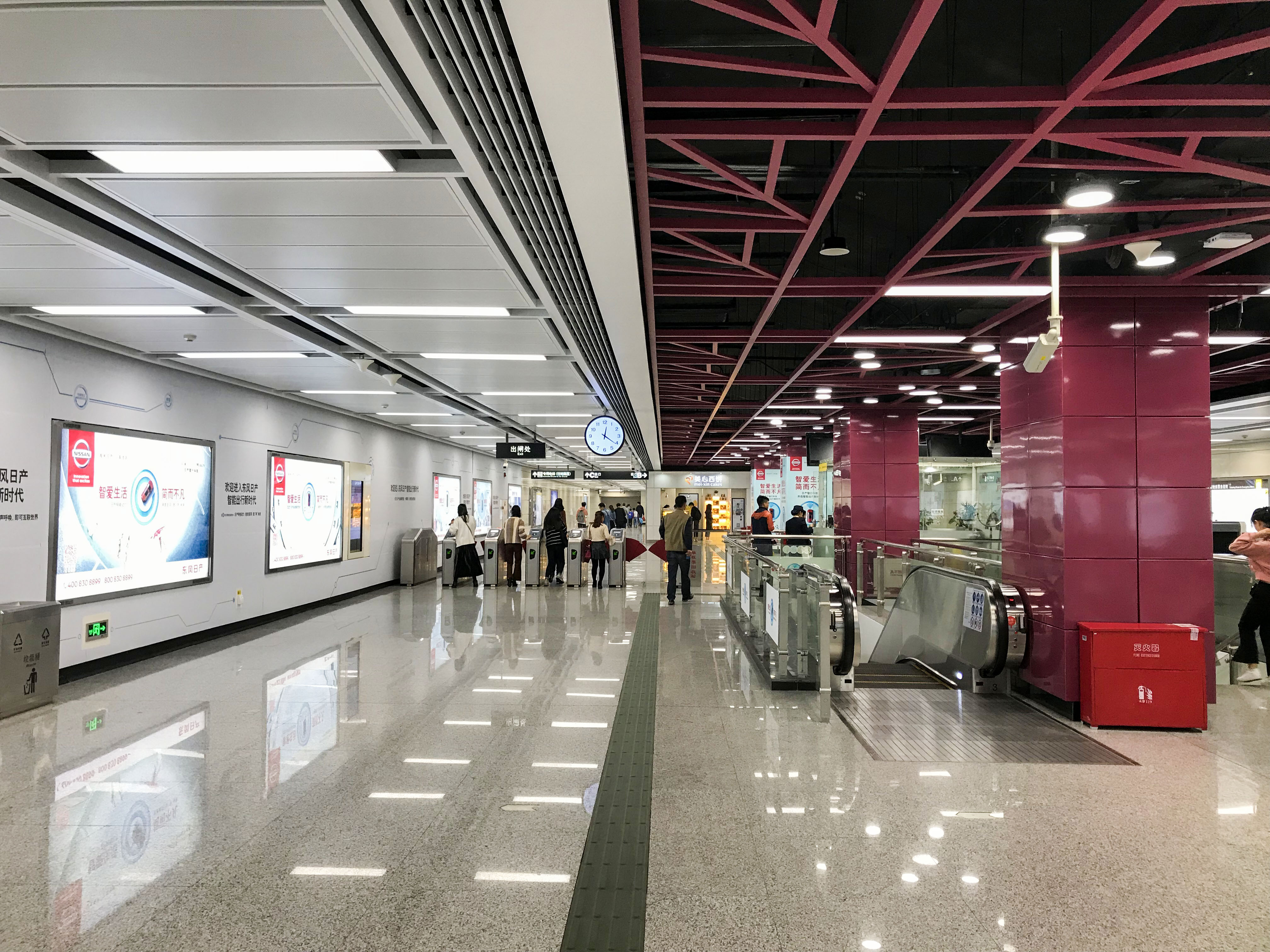 广州地铁飞鹅岭站